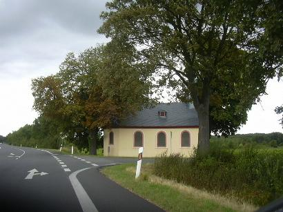 Antoniuskapelle Müddersheim, direkt an der B 477